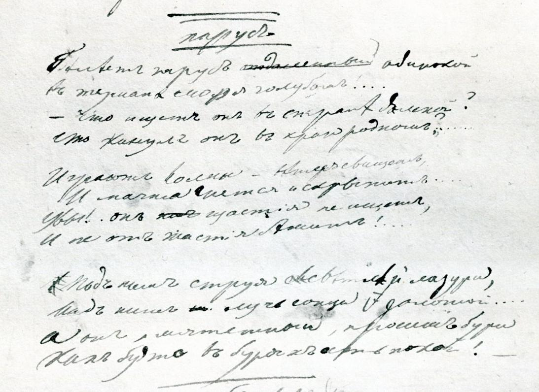 Lermontov. Sail. Autograph poem. 1832